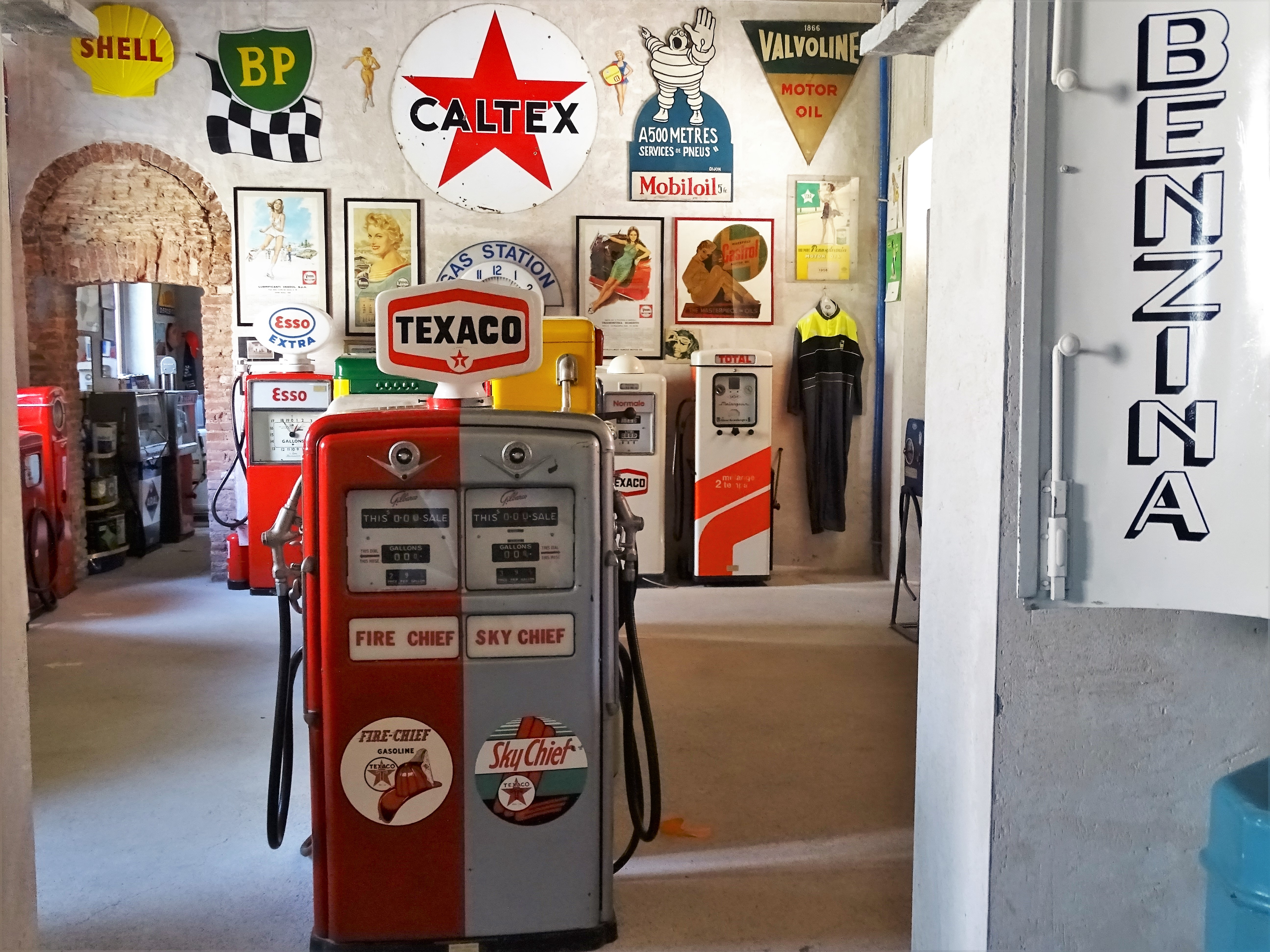 Museo Fisogni This is a photo of a monument which is part of cultural heritage of Italy.